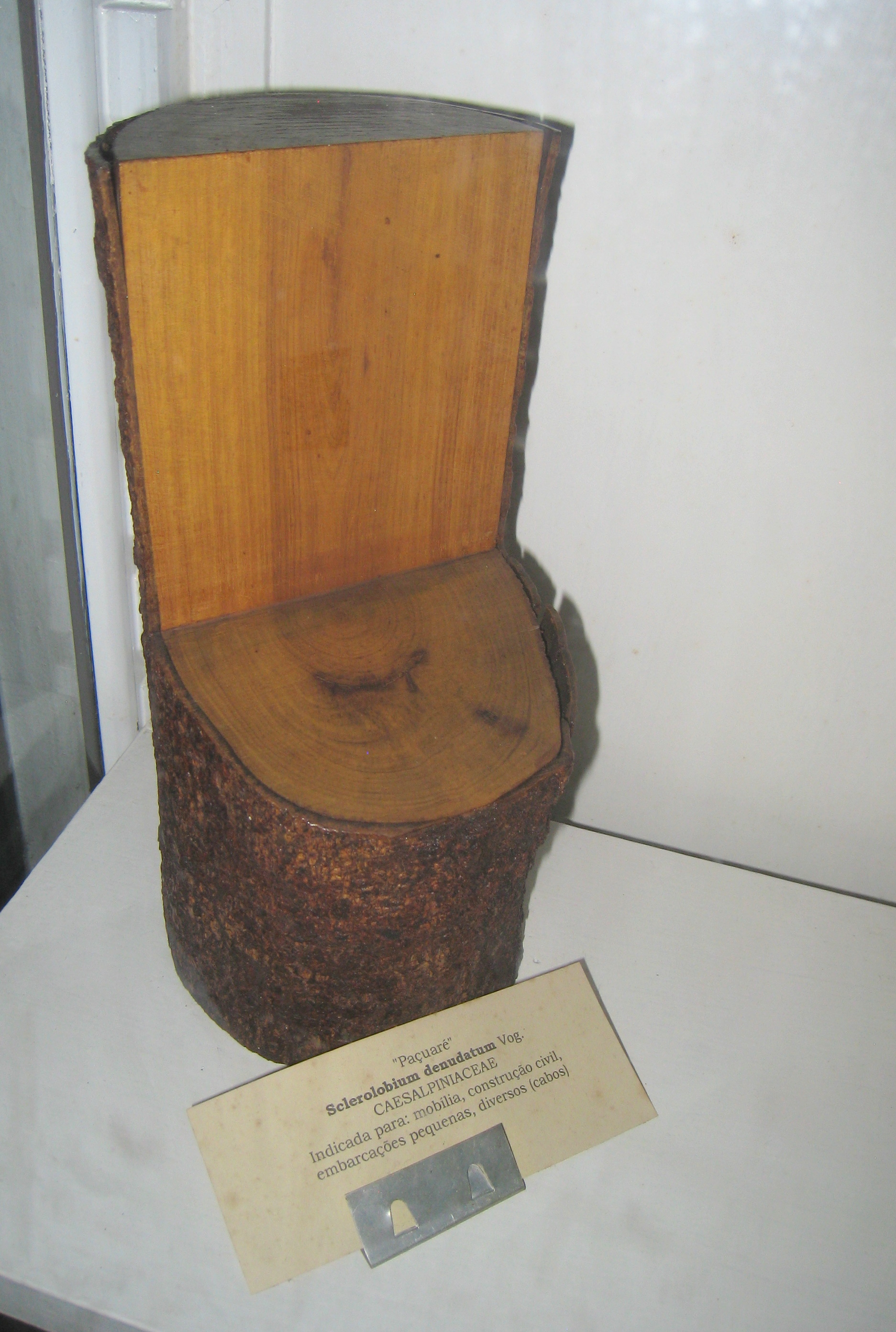 Sclerolobium denudatum specimen in the Museu Botânico Dr. João Barbosa Rodrigues, Jardim Botânico de São Paulo, São Paulo City, SP, Brazil.